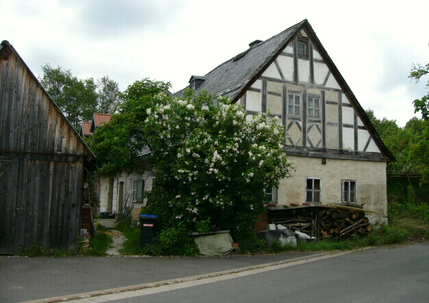 Altes Bauernhaus in Glashütten (Oberfranken)